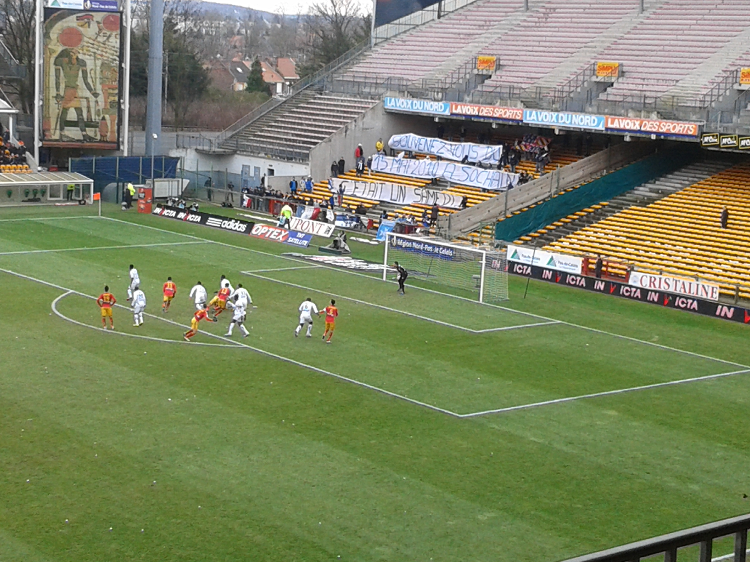 Photo des supporters de l'AJ Auxerre, déployant une banderole « Souvenez-vous du 15 mai 2010 à Sochaux, c'était un samedi. », lors de la rencontre Lens - Auxerre (1-0) du championnat de France de football Ligue 2 (seconde division française), le 16 mars 2013, au Stade Félix-Bollaert-Delelis.